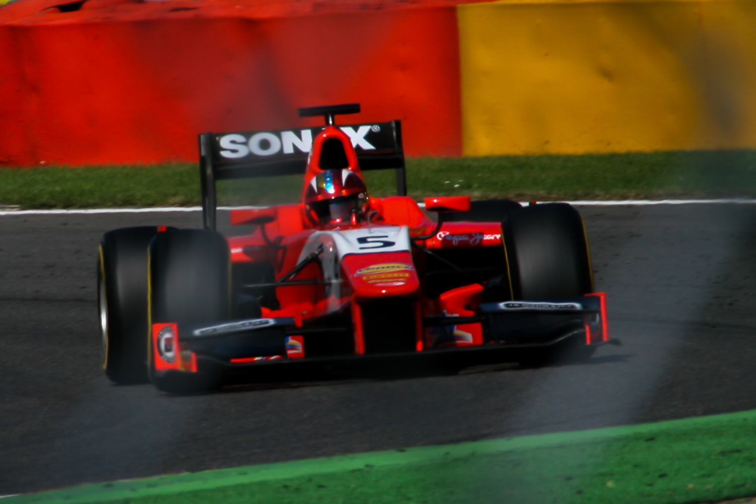 Johnny Cecotto jr. beim Qualifying der GP2-Serie in Spa-Francorchamps 2013.